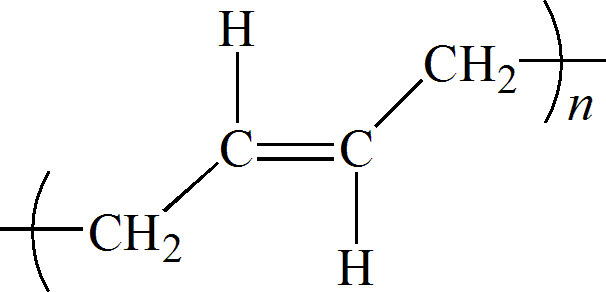 trans 1-4 polibutadieno